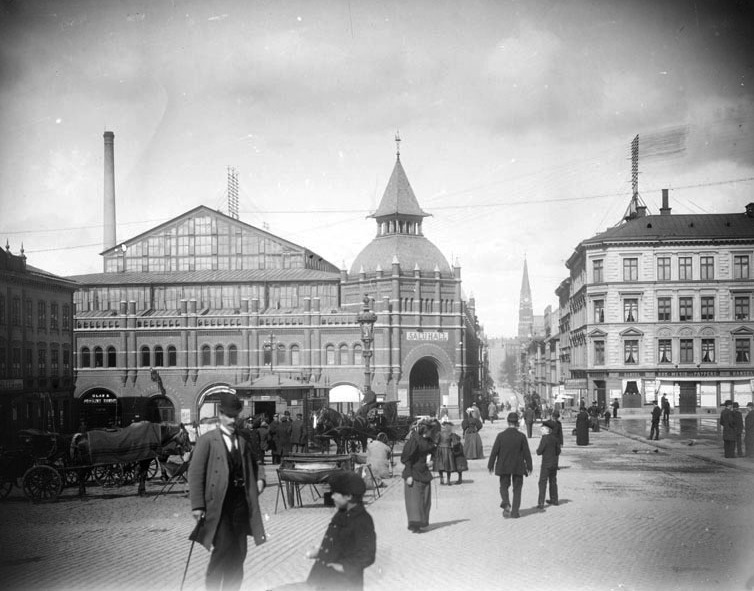 Östermalmstoerg i Stockholm 1896